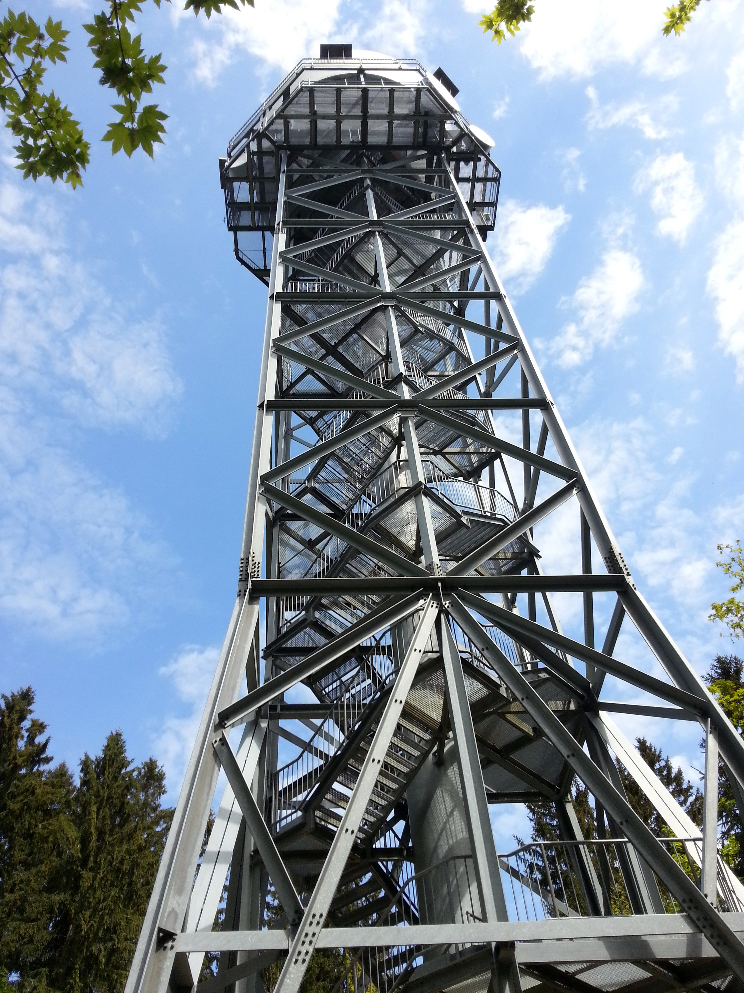 Hagenturm